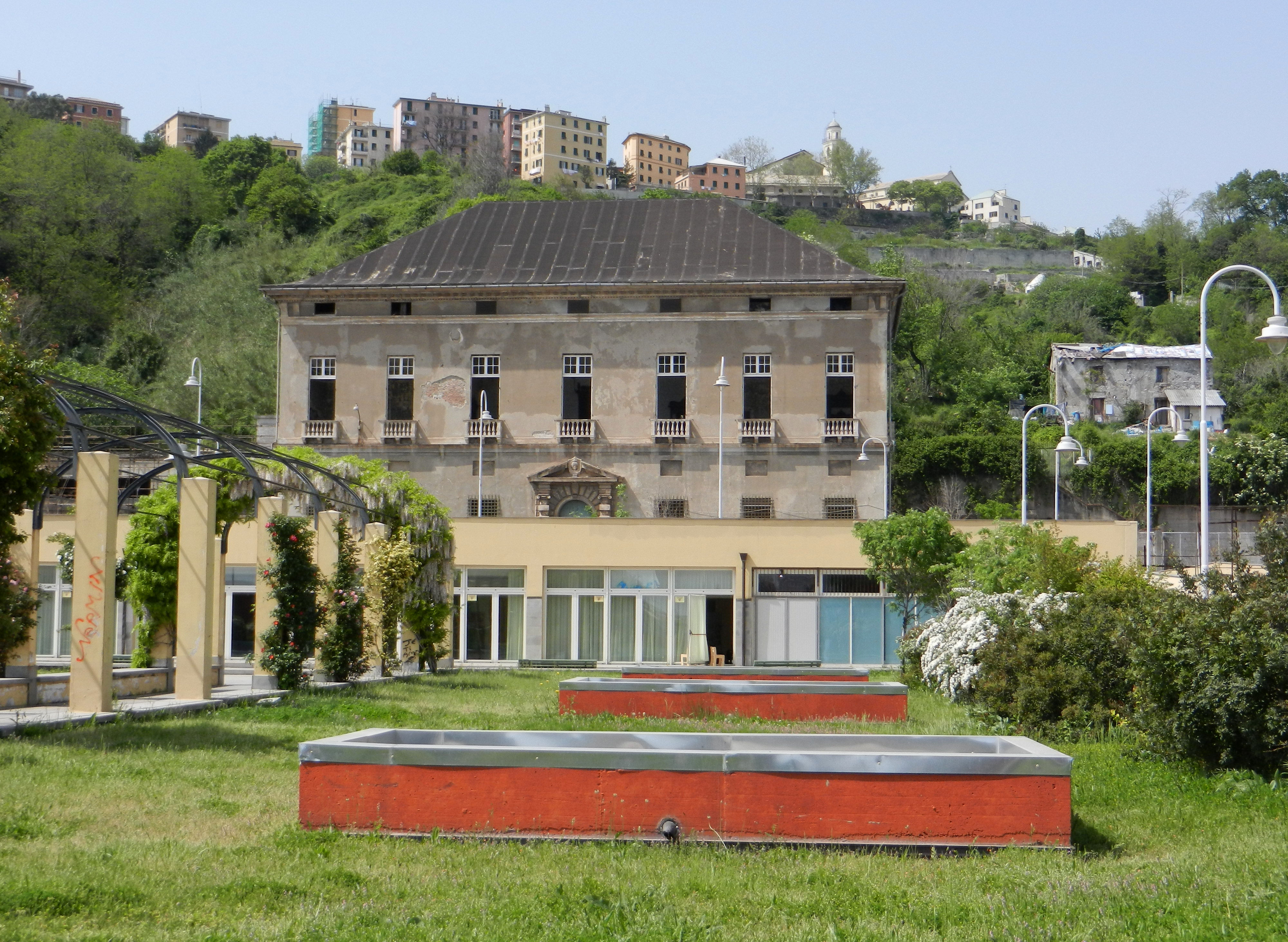 Genova, loc. Campi, villa Imperiale Casanova